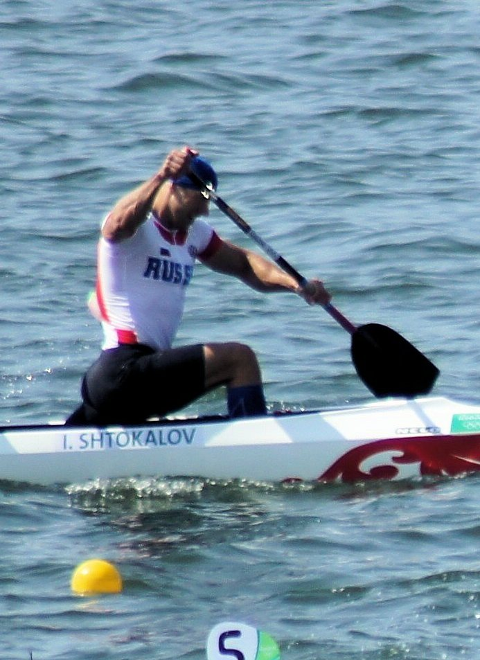 Rio 2016. Canoagem de velocidade/Canoe sprint